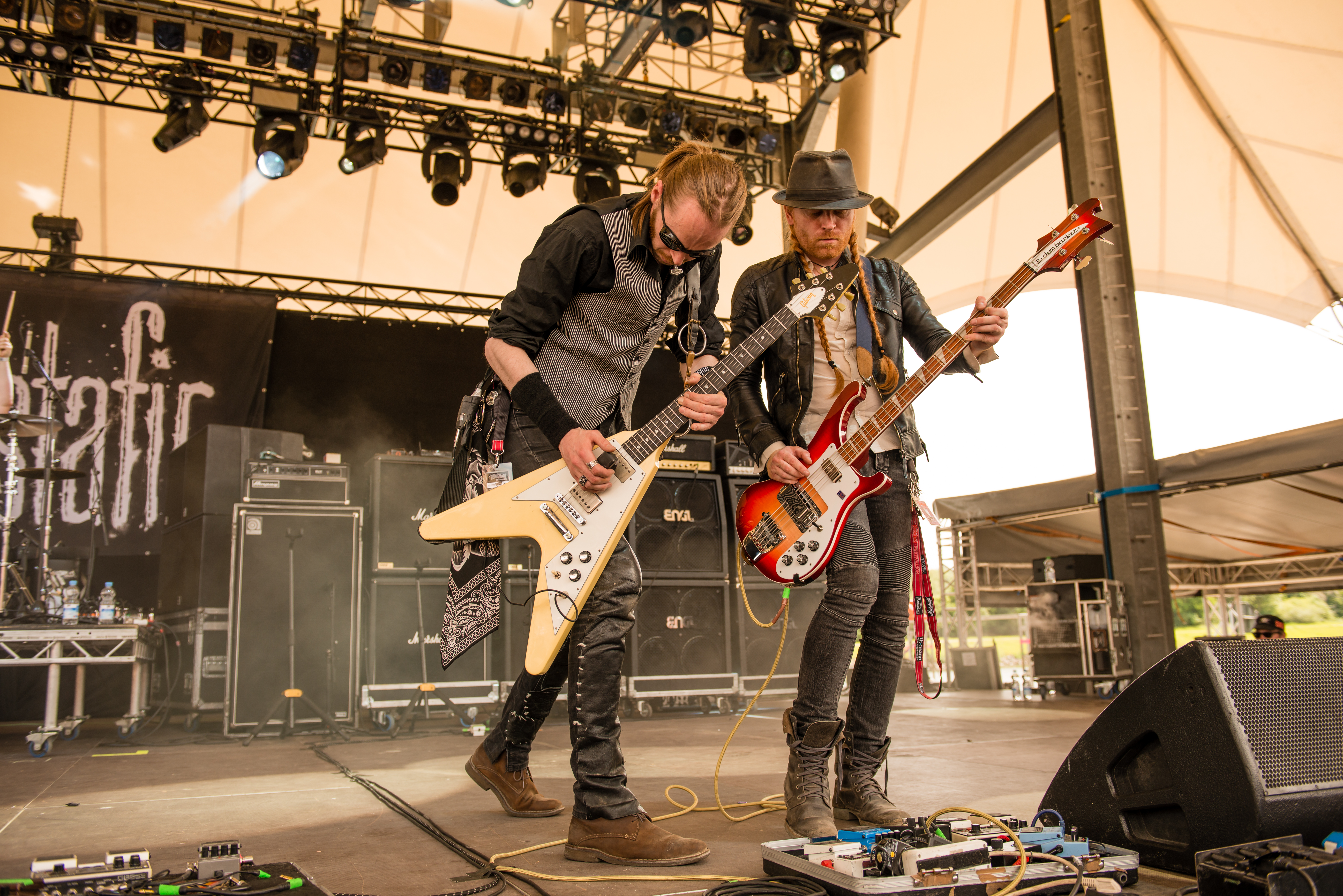 'Rock Hard Festival 2014 - Gelsenkirchen': 'Sólstafir'